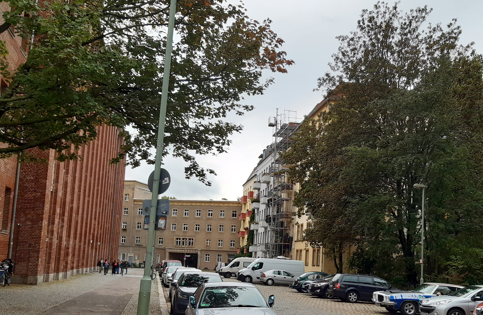 Blick zum südlichen Abschluss der Lasdehner Straße mit dem Hoffmannschen Schulgebäude auf der Ostseite, der erhaltenen Vorkriegsbebauung auf der Westseite und dem Wohnhaus Nummer 32 mit einem Fußgängerdurchgang zur Gubener Straße Ecke Grünberger Straße. Dieses Haus aus den 1950-er Jahren bildet den Übergang zu dem angrenzenden Gebäudekomplex in der Grünberger Straße „Nante-Eck“ des Architekten Rudolf Weise (1907–1991) und der Überbauung der Gubener Straße im Stil der Stalinallee.